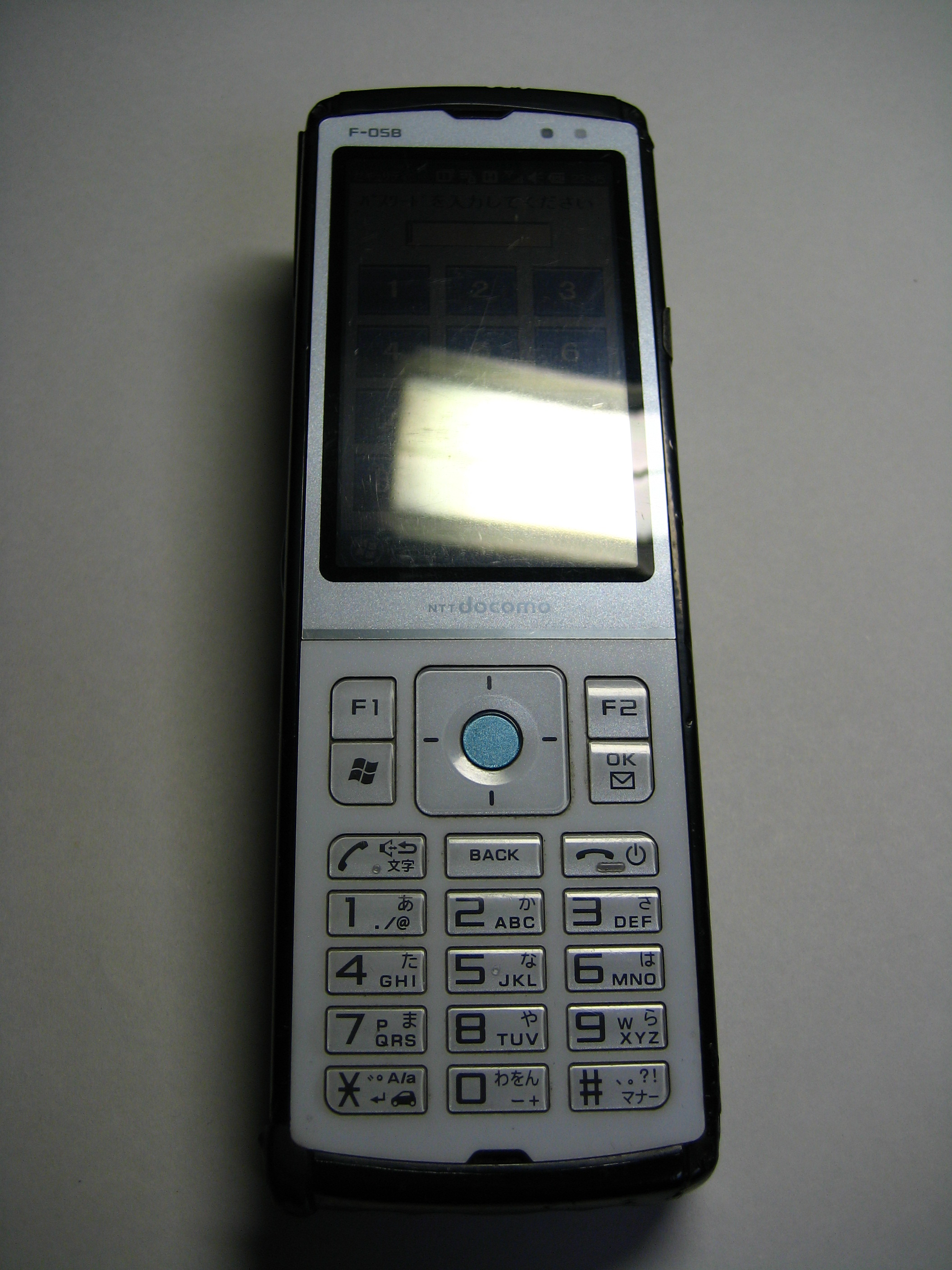 NTT Docomo F-05B